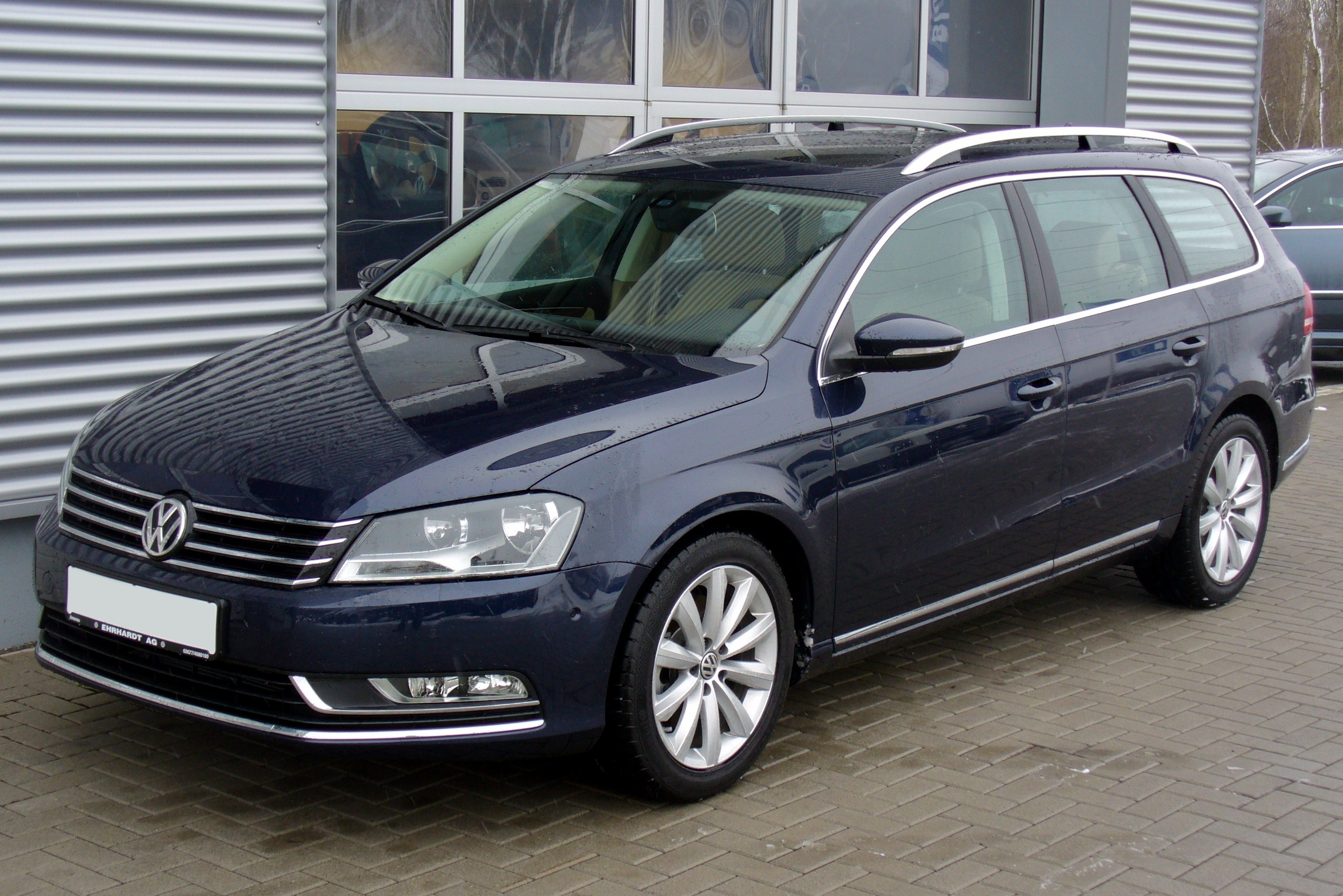 VW Passat Variant B7